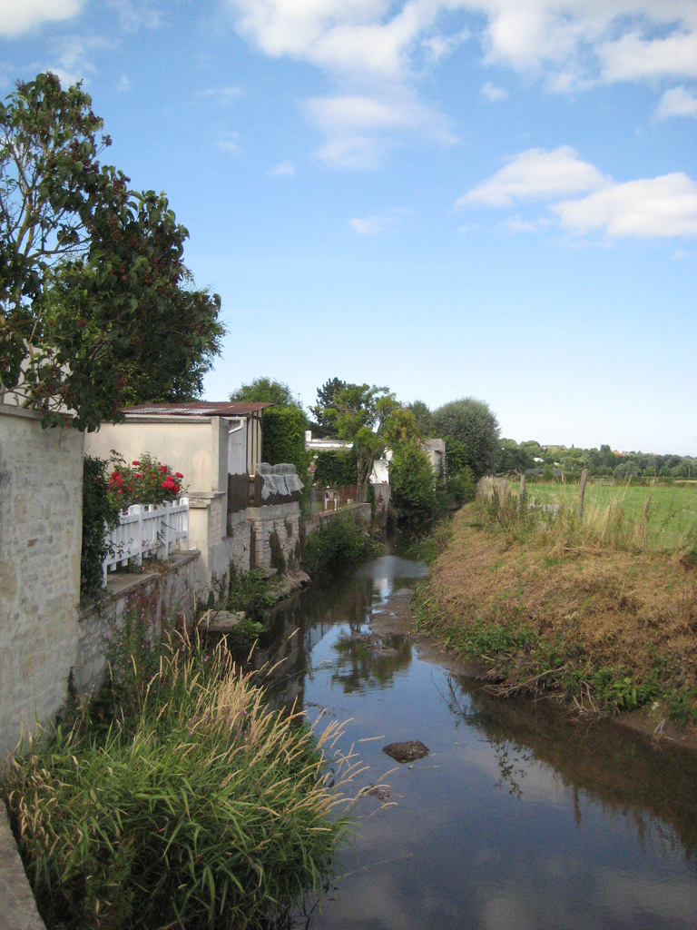 L'Odon à Bretteville-sur-Odon (Calvados, France)